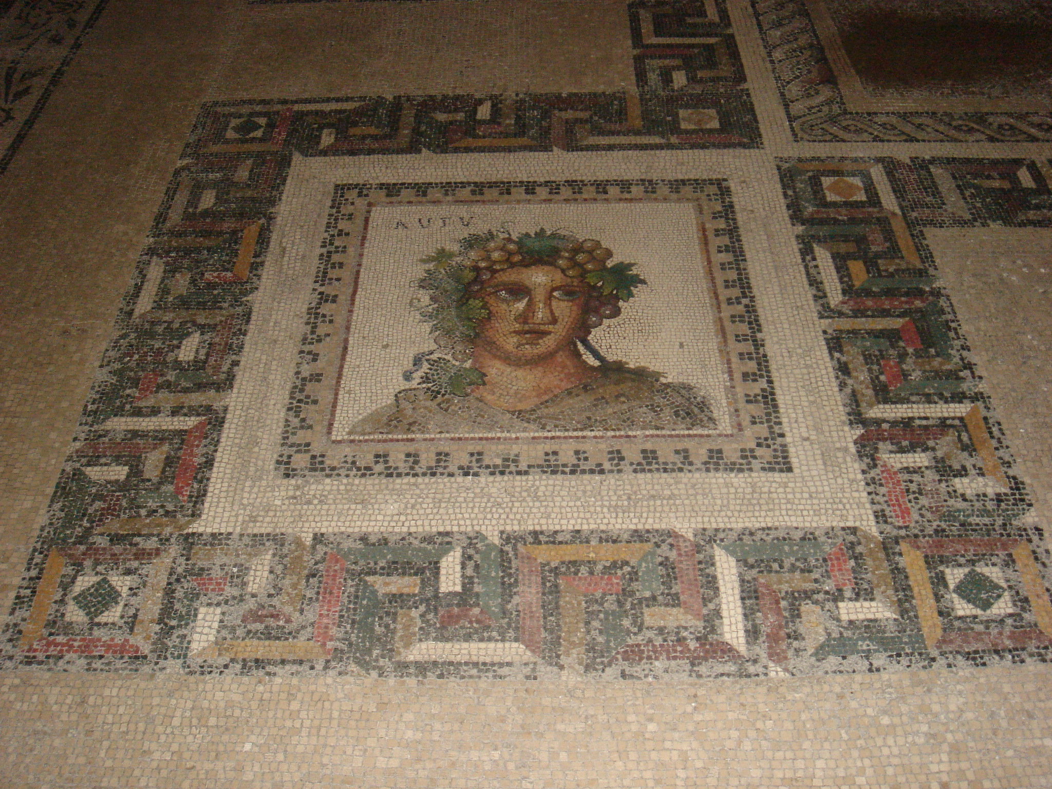 Roma, Abbazia delle Tre Fontane: chiesa di san Paolo, mosaico dal Mitreo di Ostia Antica, particolare: L'autunno.